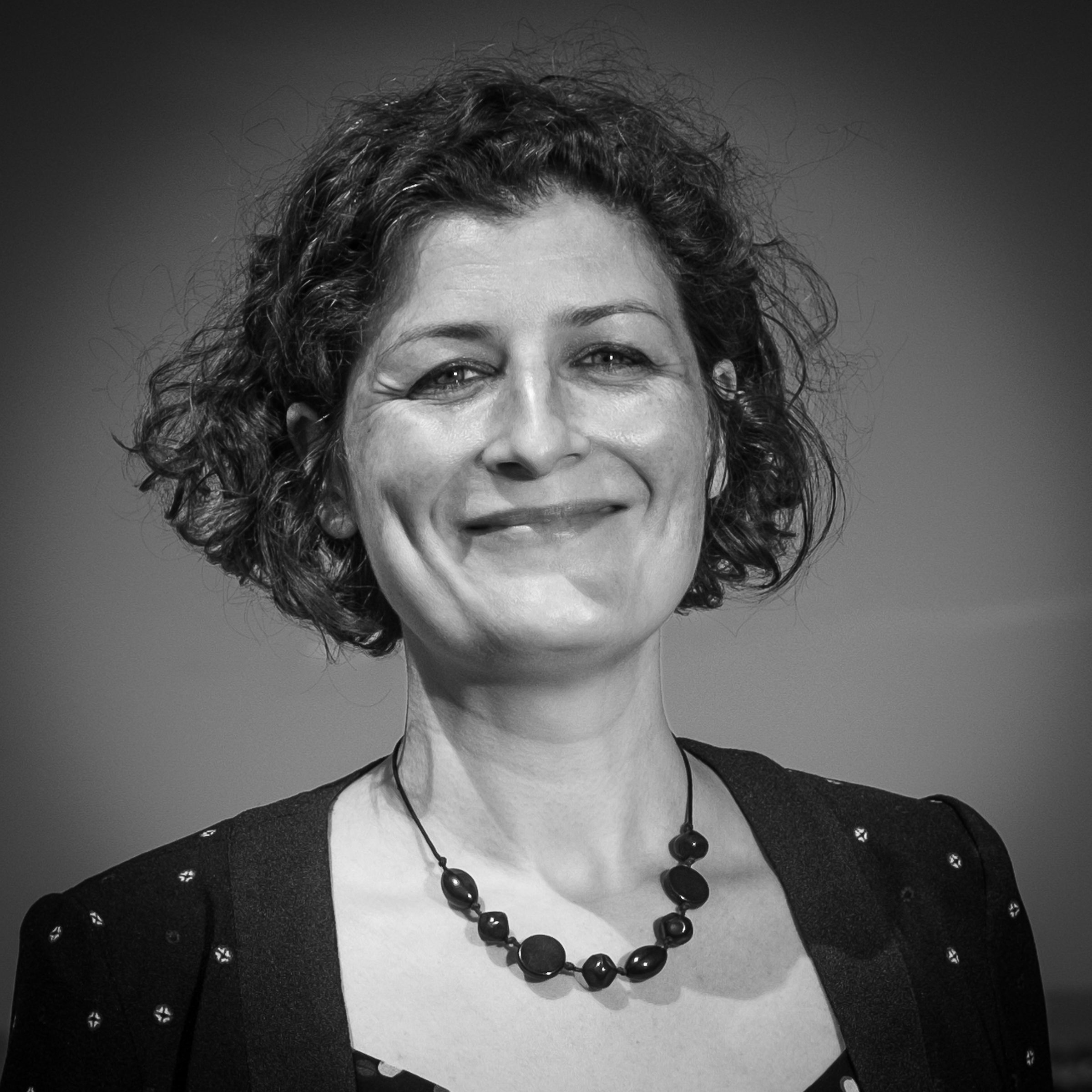 Jeanne Barseghian, designierte Bürgermeisterin von Straßburg, 2020